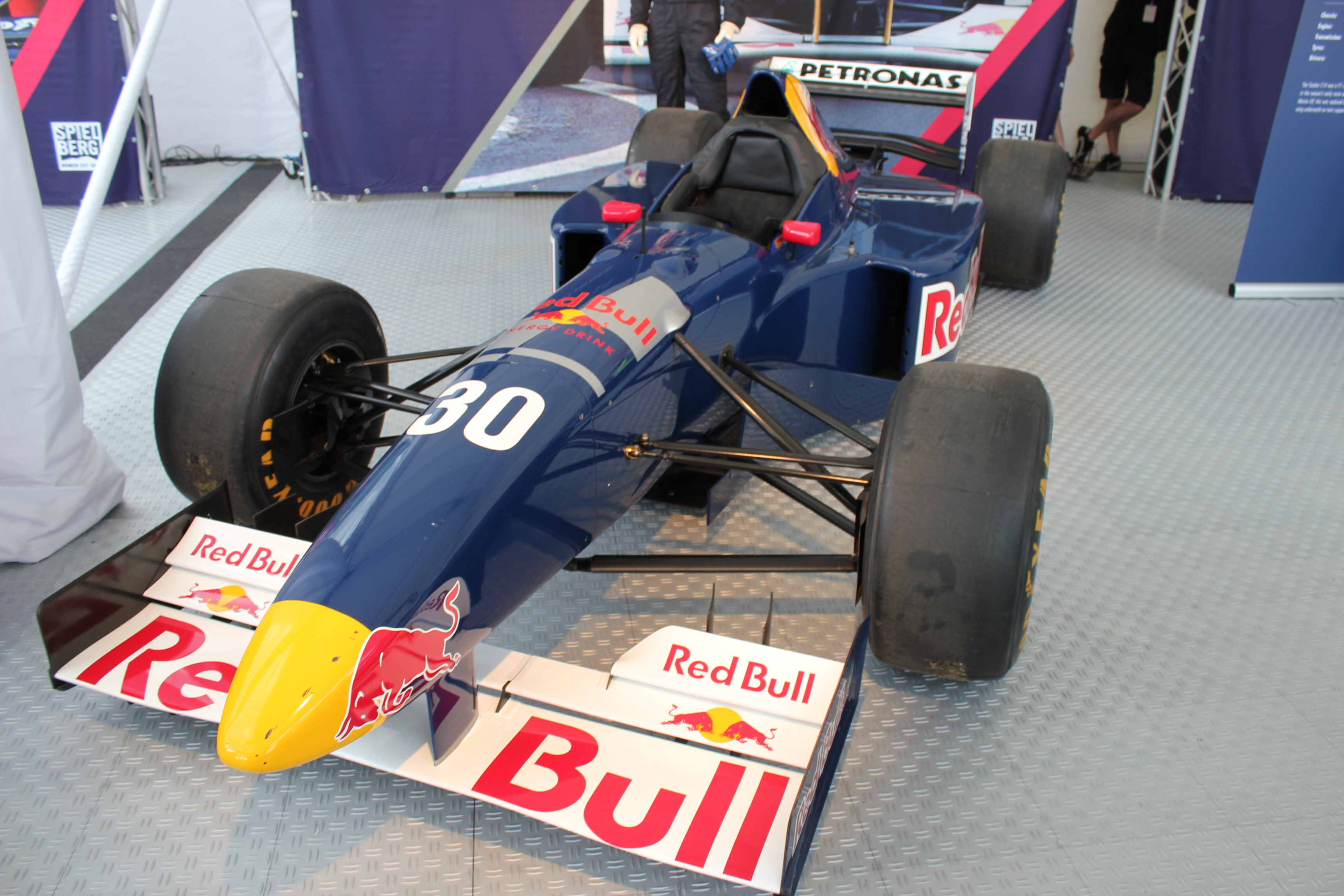 Der Frontflügel eines Sauber C14 linksseitig